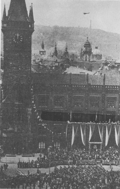 X. všesokolský slet v Praze (červen 1938)